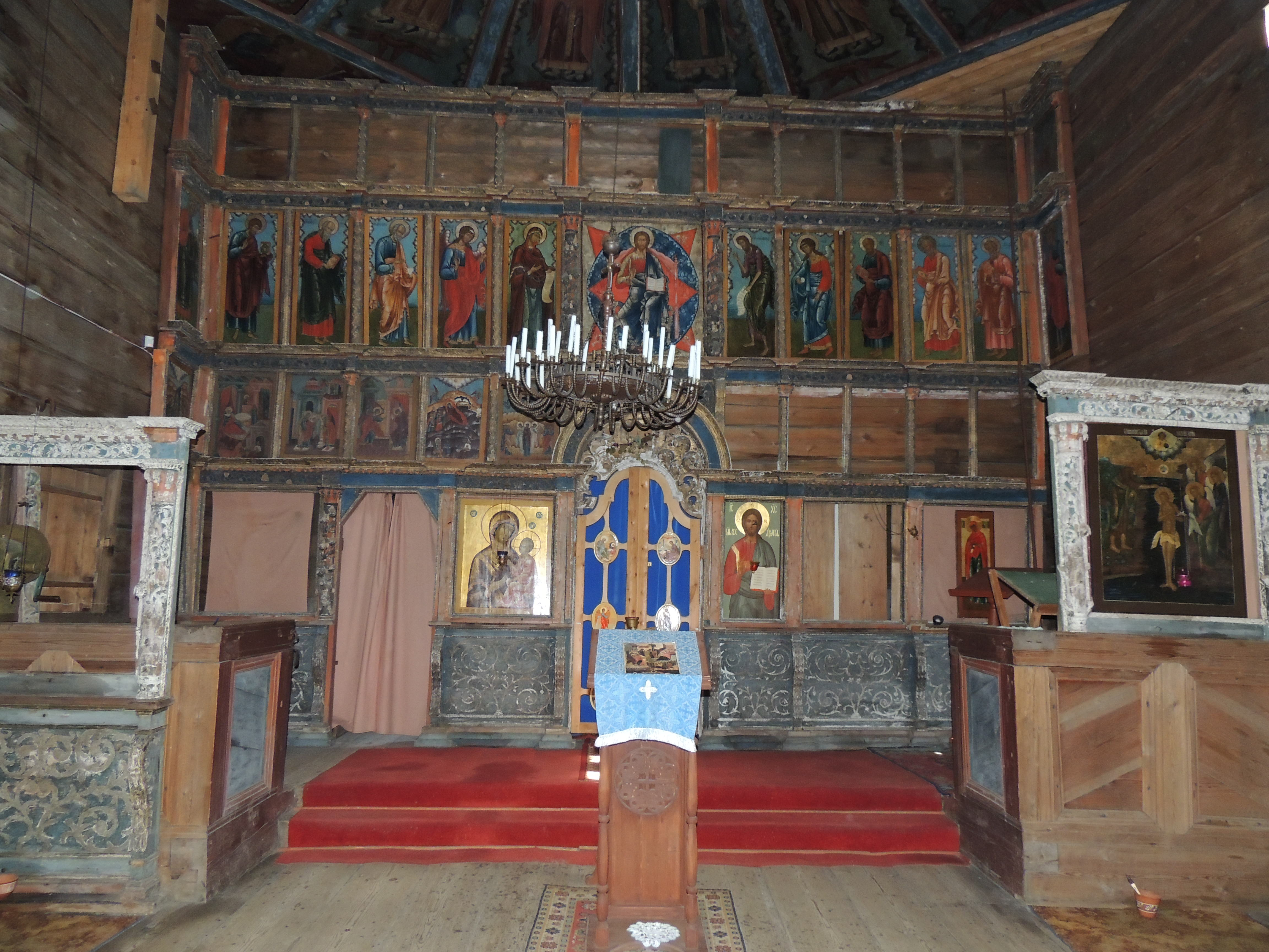 Церковь Успения Пресвятой Богородицы (деревянная) (Республика Карелия, Кондопога, на мысе, вдающемся в Чупа-Губу, Онежского озера)